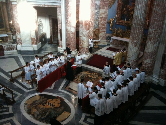 Français cadien: Quirinal